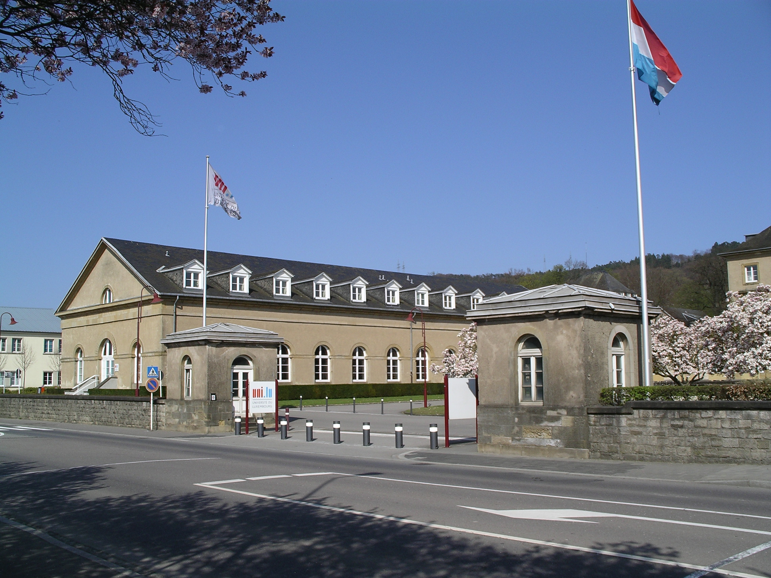 Schloss in Walferdingen (Walferdange), heute Universität Luxemburg, Luxemburg